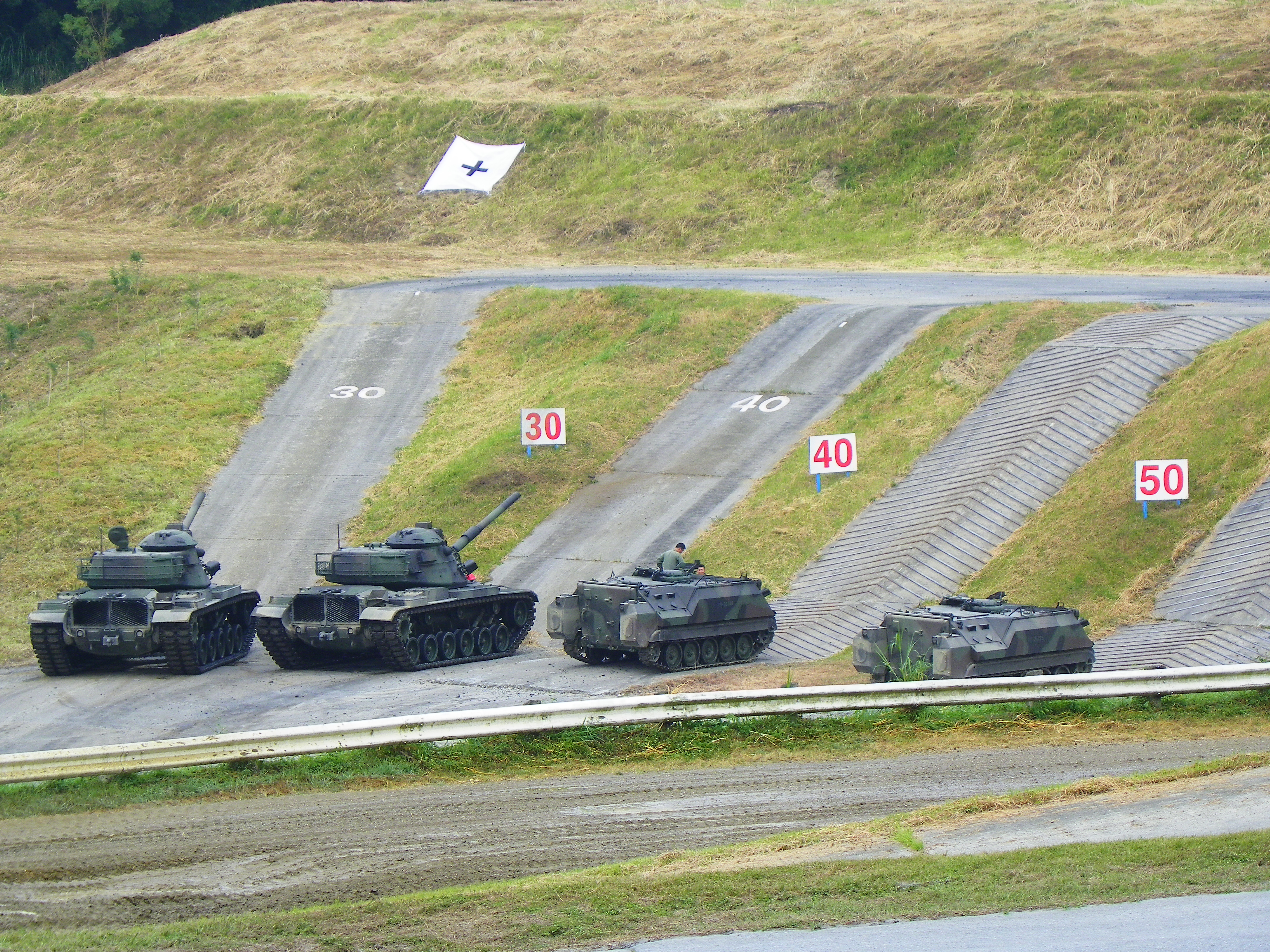 M60A3 TTS戰車與CM-21A裝甲運兵車全部回到測試場谷底，準備下一場動態性能測試。